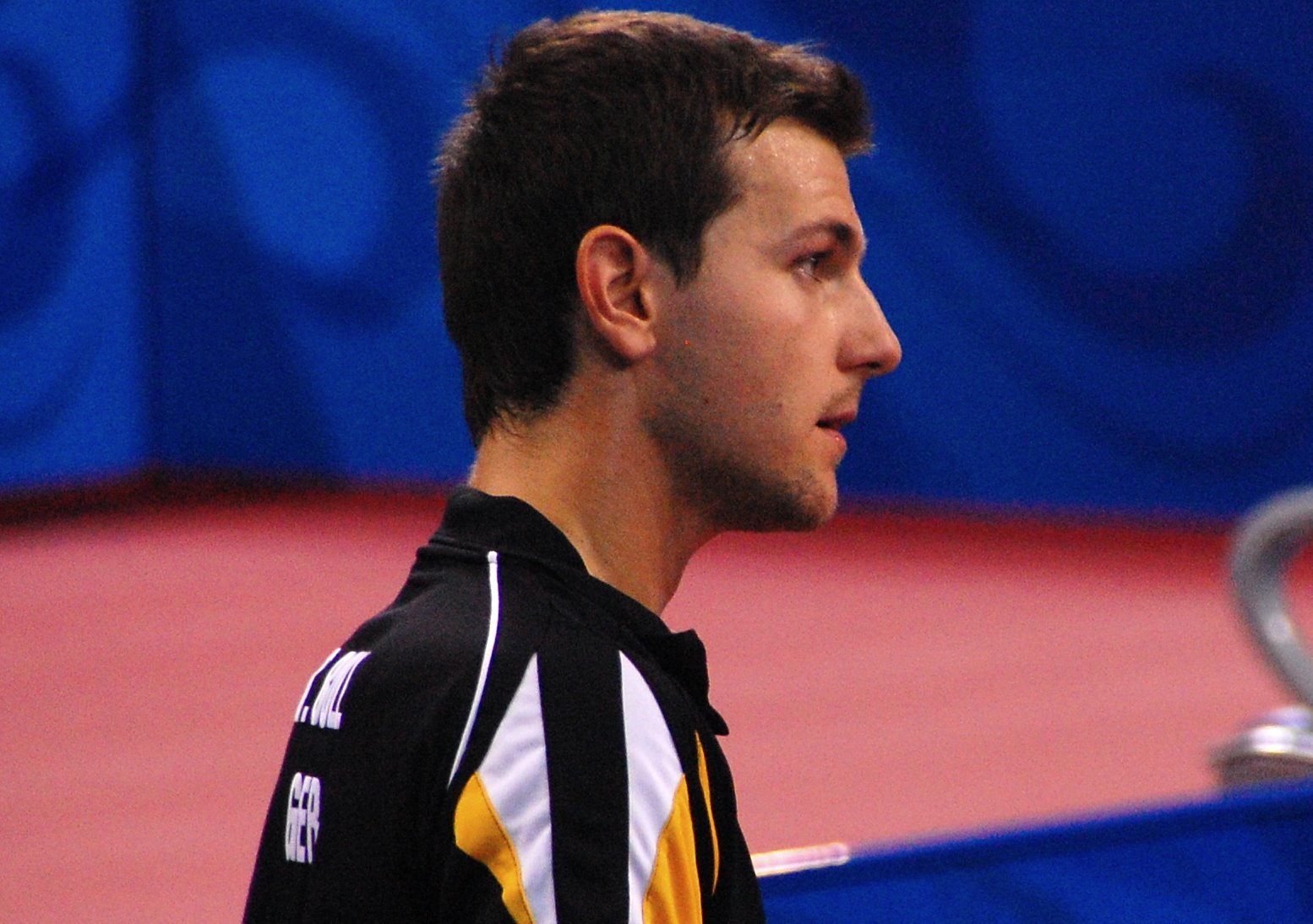 Timo Boll